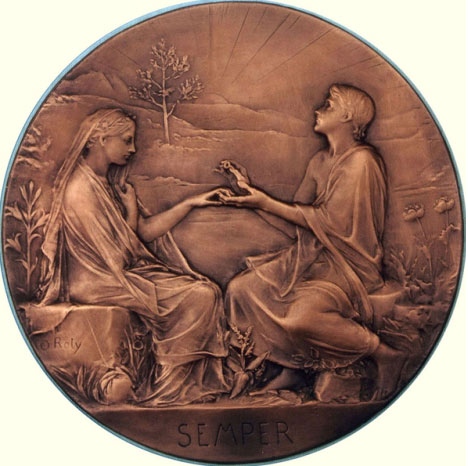 Die berühmte Hochzeits-Medaille von Oscar Roty